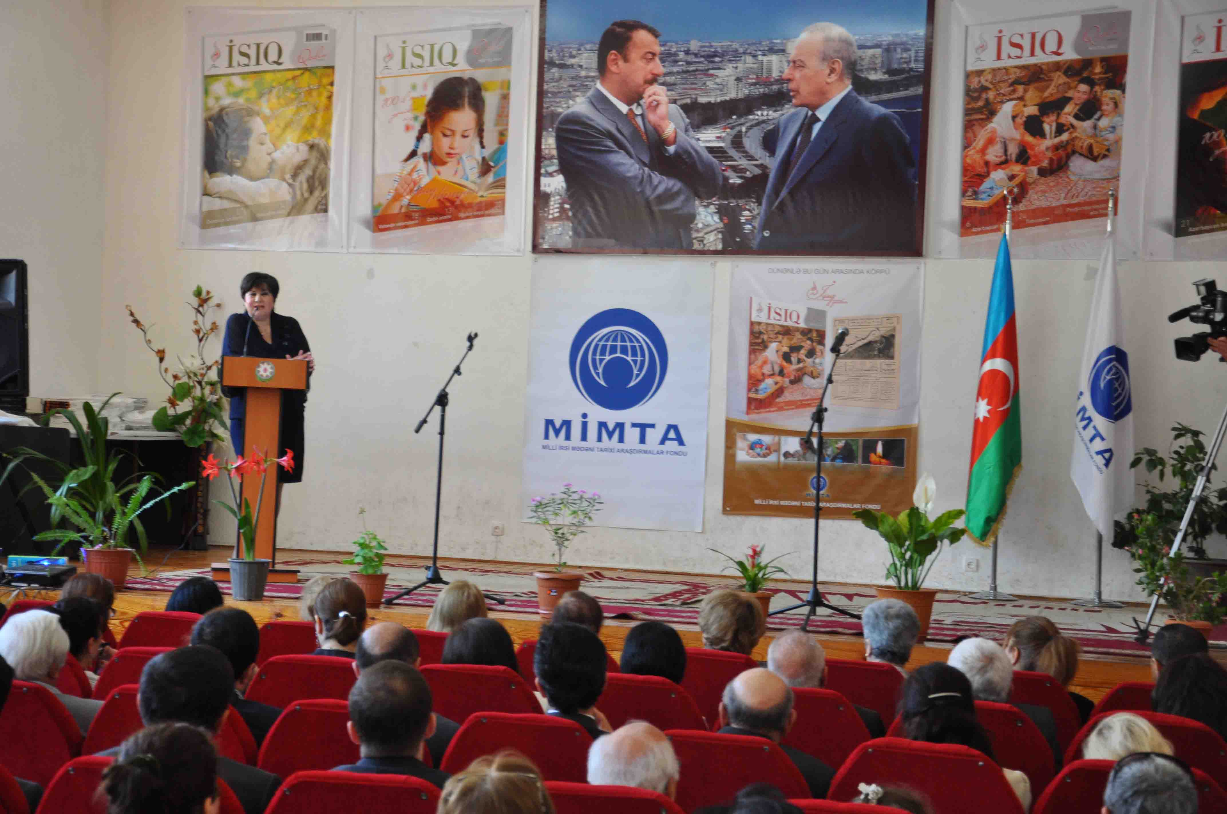 “İşıq-qadın” jurnalının 190 nömrəli məktəblə görüşü